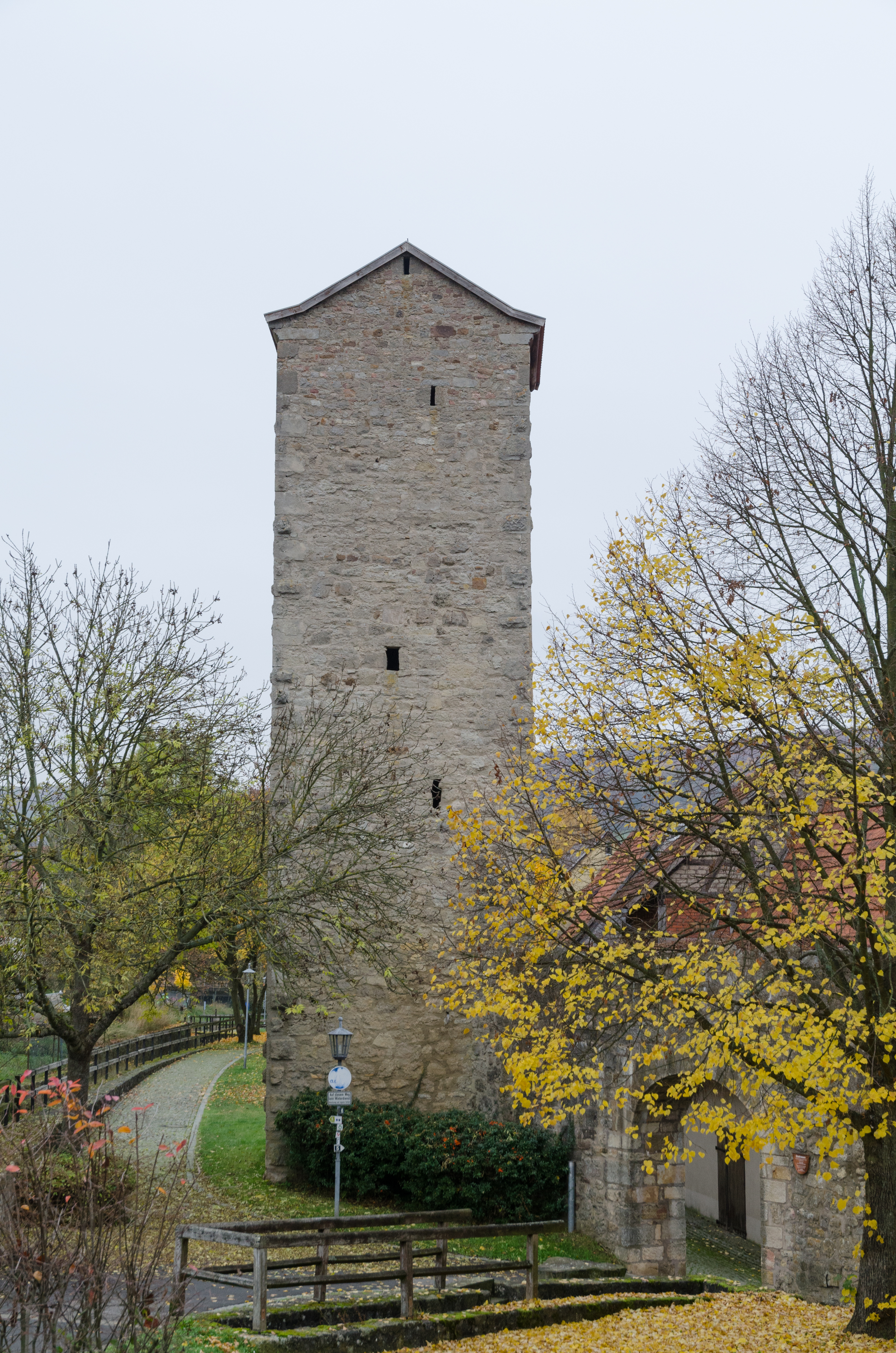 Stadtmauer Flandungen